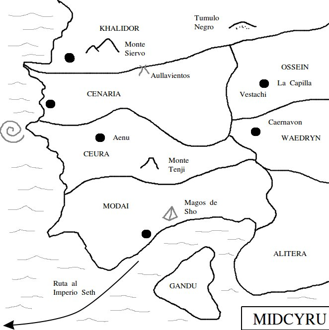 Mapa de Midcyru segun la novela de Brent Weeks El camino de las sombras, una obra de fantasía épica.